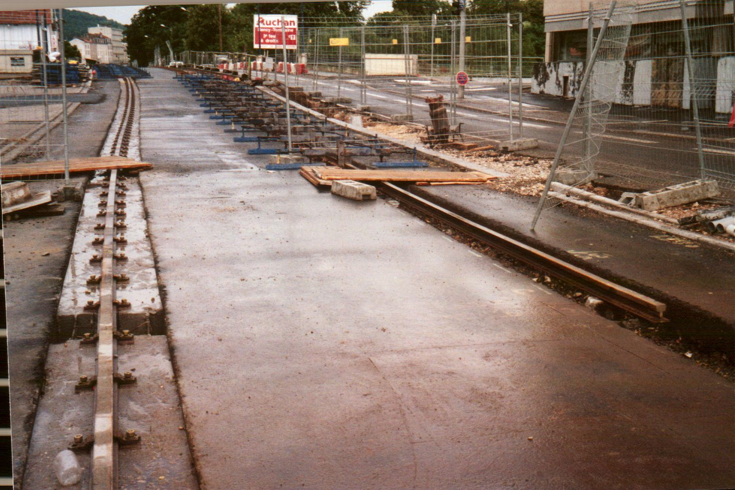 Dressage du rail de guidage des deux voies du Tramway de Nancy (Technologie Transport sur voie réservée de trolleybus guidé)